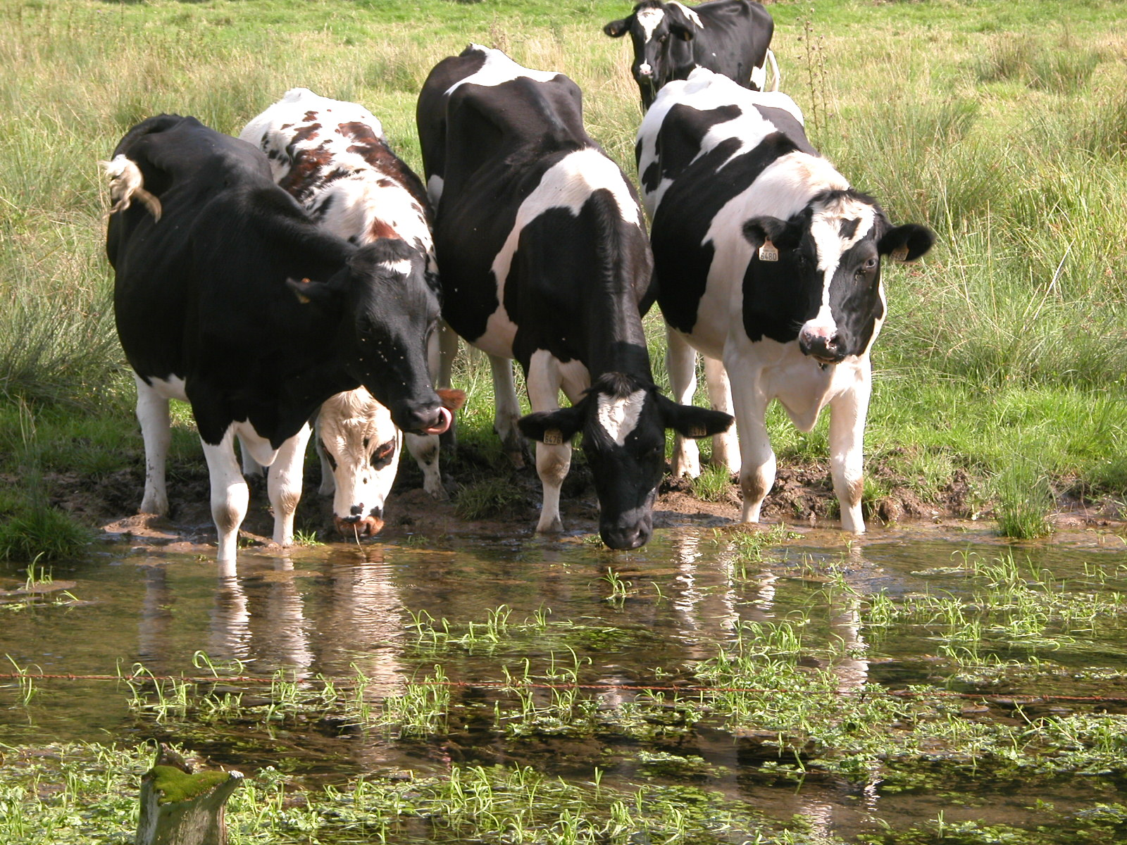 Fraîche Bresle